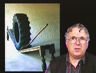 Portrait de Daniel Nadaud